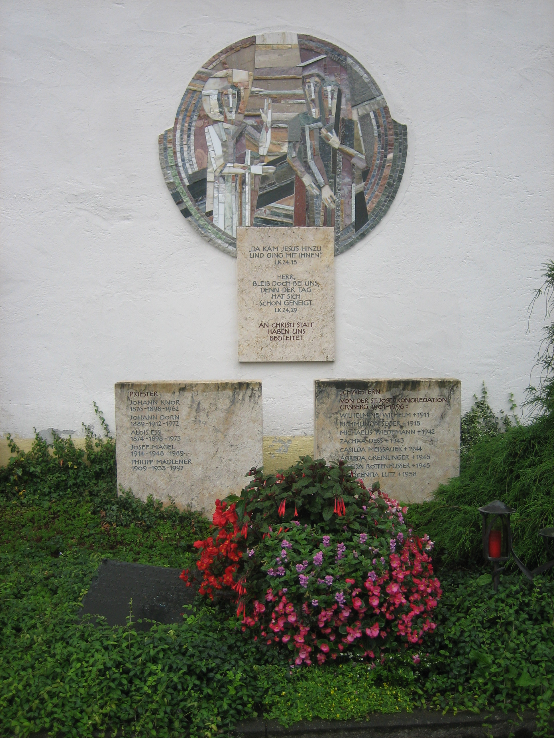 Priestergrabstätte an der Stiftskirche in bad Grönenbach